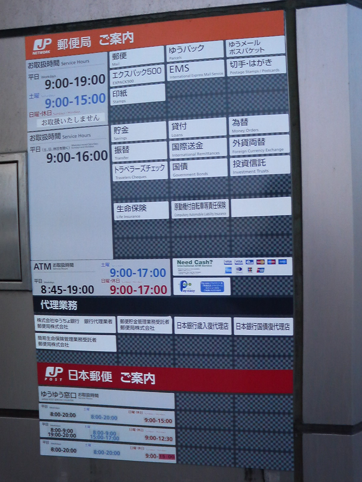 酒田郵便局の案内板